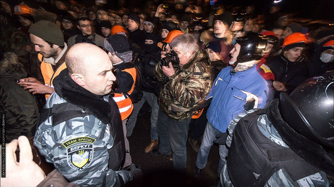 Цей файл моя власна робота